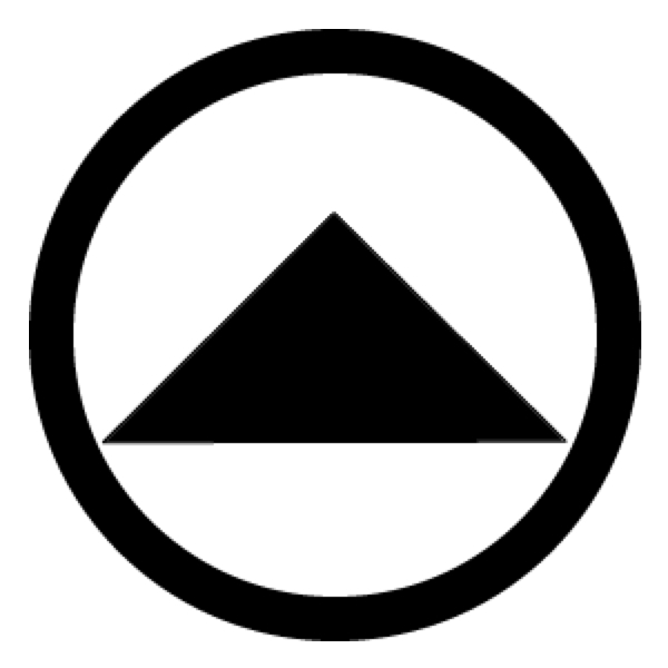 太丸に一つ鱗(北条鱗)